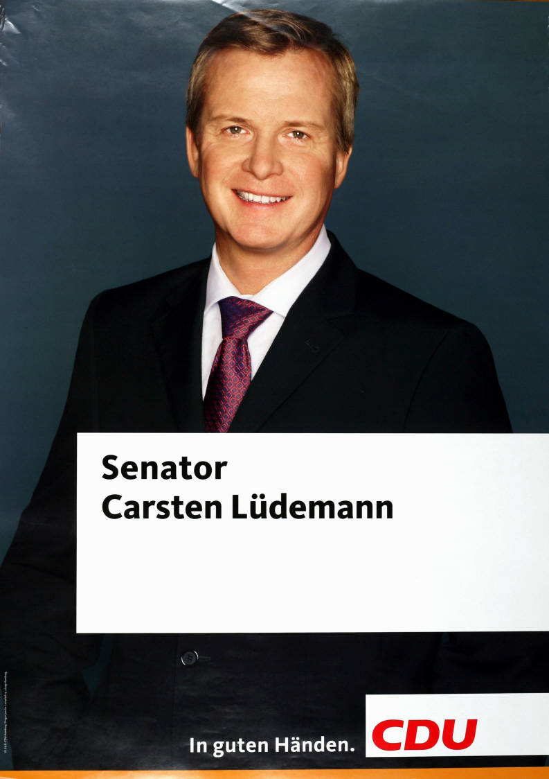 Senator Carsten Lüdemann In guten Händen. CDUAbbildung:FotoPlakatart:Kandidaten-/Personenplakat mit PorträtAuftraggeber:V.i.S.d.P.: CDU Hamburg, Gregor Jaecke, HamburgObjekt-Signatur:10-006 : 1831Bestand:Plakate zu Bürgerschaftswahlen Hamburg ( 10-006)GliederungBestand10-18:Plakate zu Bürgerschaftswahlen Hamburg (10-006) » CDULizenz:KAS/ACDP 10-006 : 1831 CC-BY-SA 3.0 DE